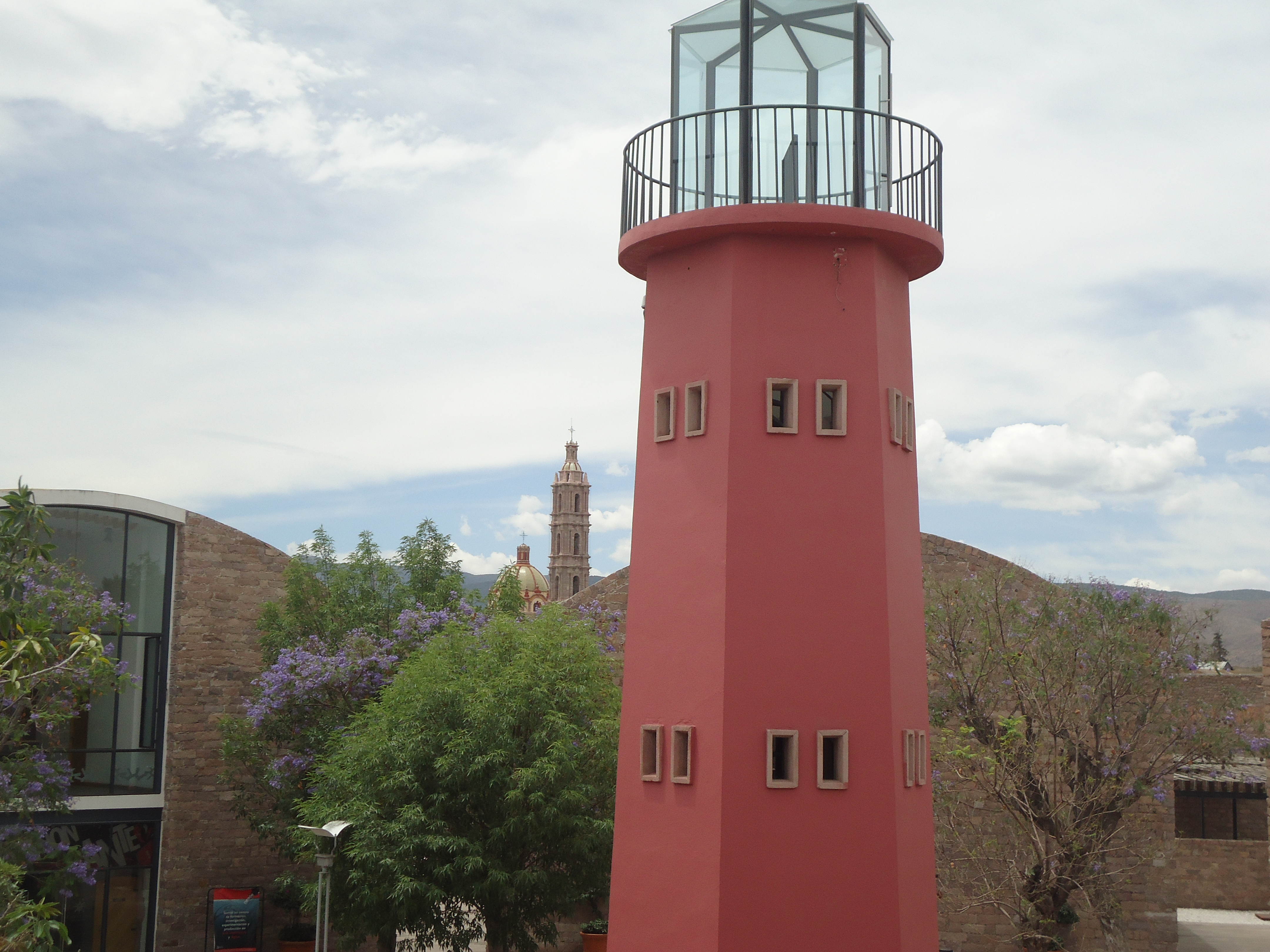 Panóptico de la antigua penitenciaría, hoy Centro de las Artes en San Luis Potosí México